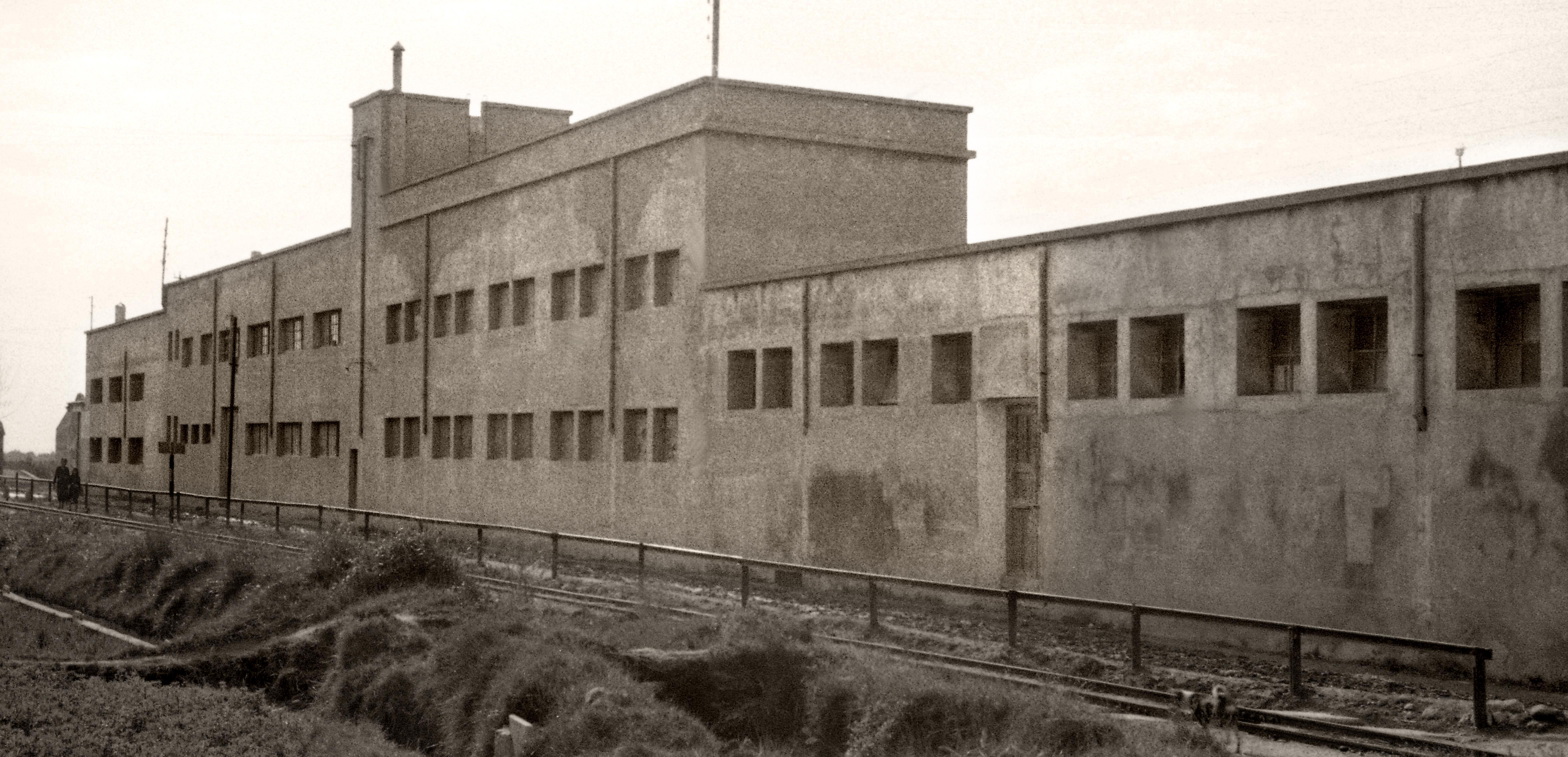 Projecte de col·laboració de l'Arxiu Ismael Latorre Mendoza amb Wikimedia Commons i Amical Wikimedia. Fotografia d'Ismael Latorre Mendoza, amb data: 27-01-1950. Negatiu molt complicat. Al principi de la guerra civil es va projectar al País Valencià la creació de fàbriques d'armes. Aquesta fàbrica, dirigida per tècnics d'Euskadi, es dedicà a produir especialment pistoles del nou llarg, amb galtes de nacre i l'anagrama RE. Sembla que en desembre de l'any 1937 o gener del 38 ja estava produint. Encara avui es conserva part de l'estructura que es va fer aprofitant un antic magatzem. S'hi pot veure la torre de la fàbrica. Fins ara s'ha editat aquesta imatge a dues revistes i als llibres següents: LOZANO, Josep i altres. Aljannat I. Història d'Alginet des del segle XIV a l'any 1939; any 2006. Edita: Ajuntament d'Alginet; ISSN 1886-984 X, p.113 FORNÉS, Alberto; Císcar, José i Latorre, Ismael: Alginet, històries, costums i altres relats, Societat Cultural Alèdua, Alginet, 2003. Dipòsit Legal: V-2546-2003, p.105 Revista Española de Historia Militar, nº 59, ediciones Quirón. Abad, Josep Maria y Fuentes, Francisco: La Fábrica de armas de Alginet. ISSN 1575-9059, 2005, págs. 199-202. Falta citar l'autoria. ESTIRADO, Manuel: La pistola de la República, València; edita: Manuel Estirado. D.L. V-710-09 ISBN 978-84-613-5097-1 Falta citar l'autoria, p. 231 BOSCH LÓPEZ, Rafael: L'urbanisme d'Alginet entre els segles XII-XX. Edita: Ajuntament d'Alginet; 2019. Dipòsit Legal V-1250-2019 ISBN 978-84-09-10894-7 Pàgina 287. Tractament digital: Carolina Latorre Canet.